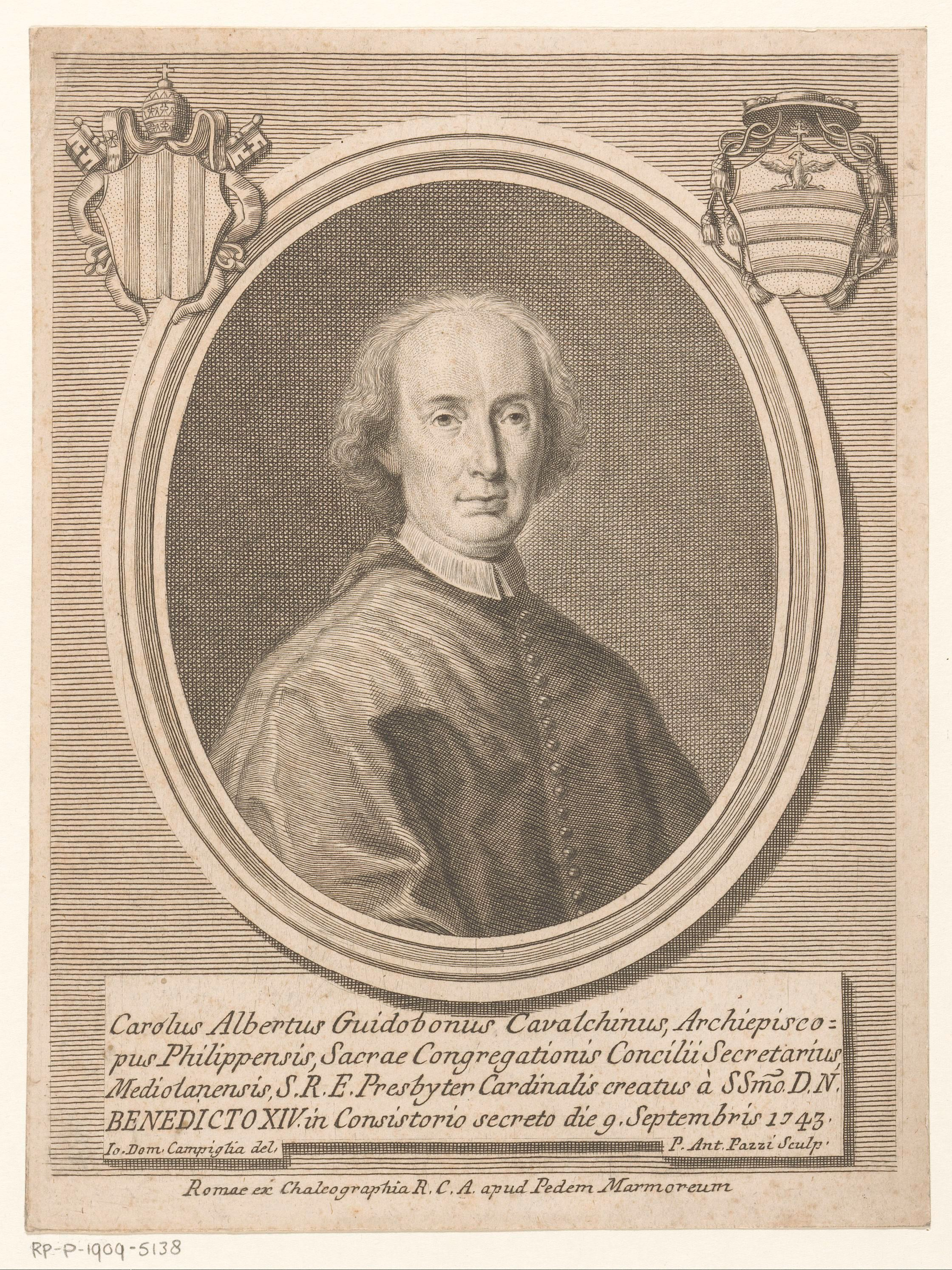 IdentificatieTitel(s): Portret van kardinaal Carlo Alberto Guidobono CavalchiniPortretten van kardinalen met twee wapenschilden (serietitel)Effigies (serietitel)Objecttype: prent Objectnummer: RP-P-1909-5138Opschriften / Merken: verzamelaarsmerk, verso, gestempeld: Lugt 2228Omschrijving: Linksboven en rechtsboven een wapenschild.VervaardigingVervaardiger: prentmaker: Antonio Pazzi (vermeld op object)naar tekening van: Giovanni Domenico Campiglia (1692–1768) Alternative names Johann Dominik Campiglia; Giovan Domenico Campiglia; Domenico Campiglia; Giovann Domenico Campiglia; CampigliaDescriptionItalian painter and engraverDate of birth/death 1692 1768 Location of birth/death Lucca RomeAuthority control : Q3767154 VIAF: 74750353 ISNI: 0000 0000 8034 847X ULAN: 500019943 GND: 123066212 SUDOC: 150842082 creator QS:P170,Q3767154 (vermeld op object)uitgever: Calcographia R.C.A. (vermeld op object)Plaats vervaardiging: prentmaker: Italiënaar tekening van: Italiëuitgever: RomeDatering: 1743 - na 1768Fysieke kenmerken: ets en gravureMateriaal: papier Techniek: graveren (drukprocedé) / etsenAfmetingen: blad: h 227 mm (Binnen plaatrand afgesneden.) × b 169 mm (Binnen plaatrand afgesneden.)ToelichtingPrent uit een reeks van onbekende omvang met portretten van kardinalen. De prenten werden vanaf 1657 vervaardigd in opdracht van uitgever Giovanni Giacomo de’ Rossi, Waar: na de productie werd voortgezet onder leiding van zijn opvolgers Domenico de’ Rossi en Lorenzo Filippo de’ Rossi, en ten slotte onder leiding van de Calcographia R.C.A.OnderwerpWat: historical personscardinalWie: Carlo Alberto Guidobono CavalchiniVerwerving en rechtenVerwerving: aankoop 1905Copyright: Publiek domein